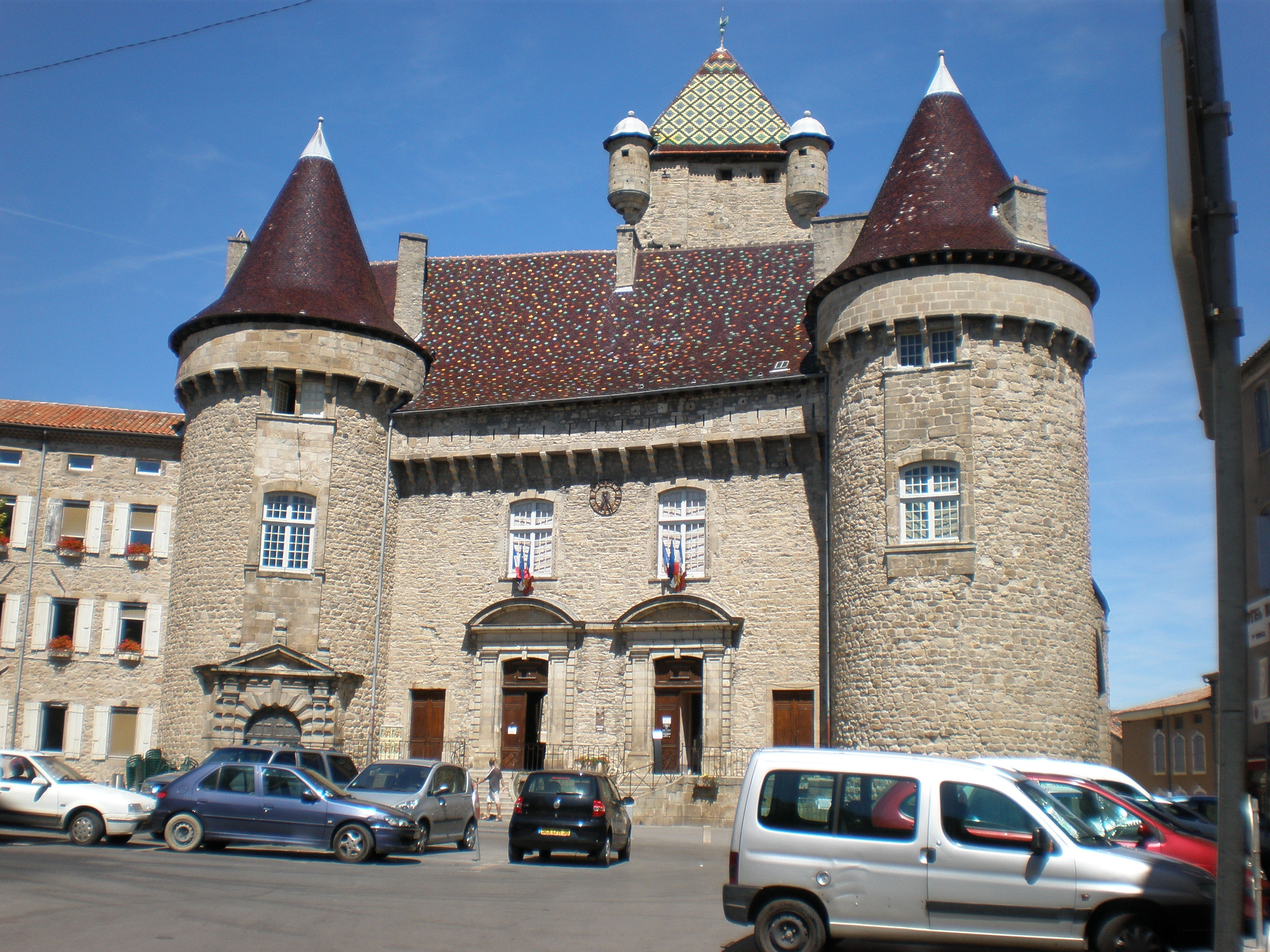 Le Château d'Aubenas (Ardèche)